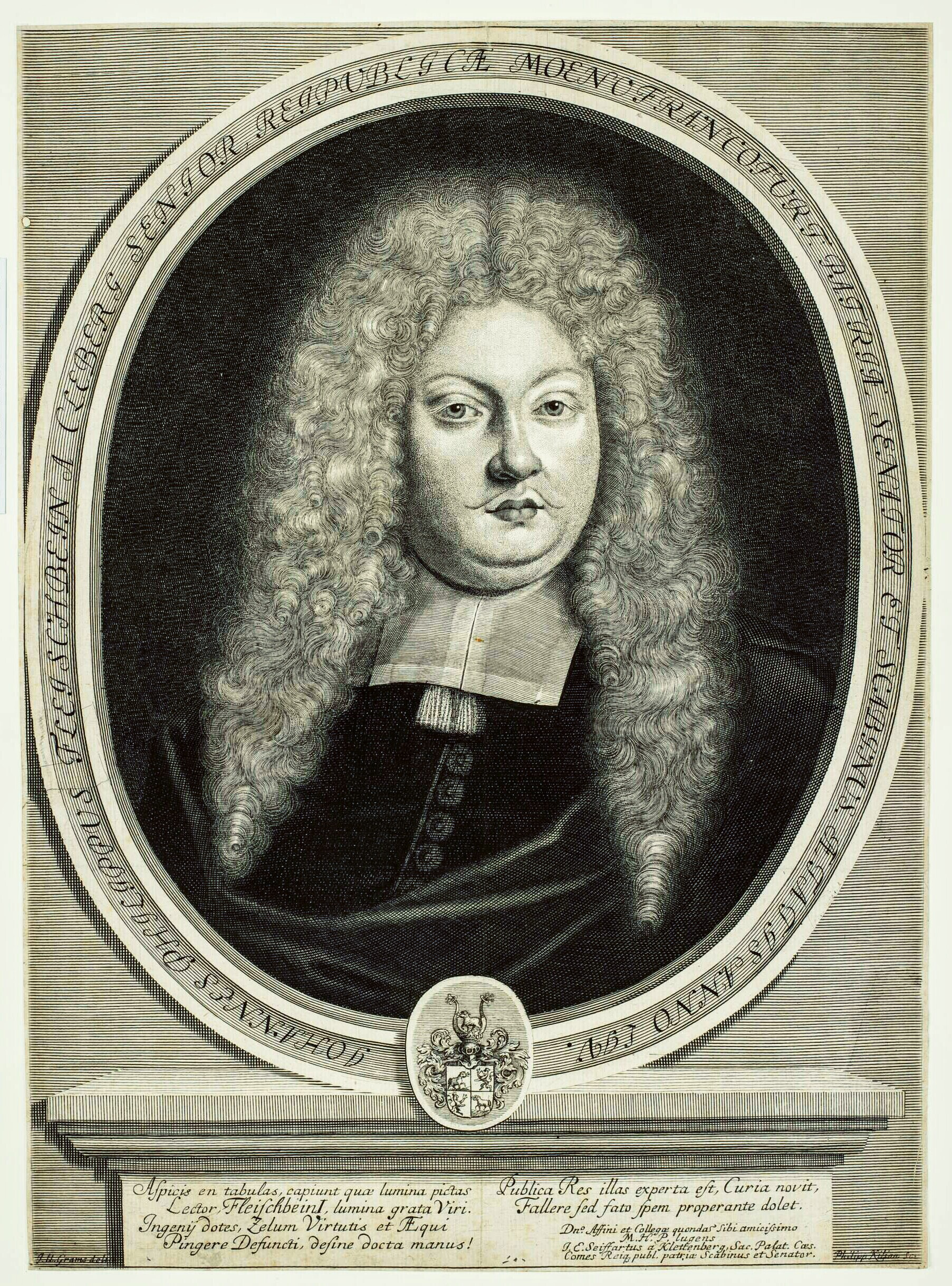 Johann Philipp Fleischbein von Kleeberg der Jüngere (1637–1691), Frankfurter Patrizier